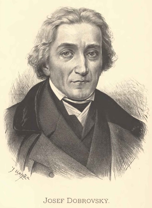 Portréty předních osobností od Jana Vilímka